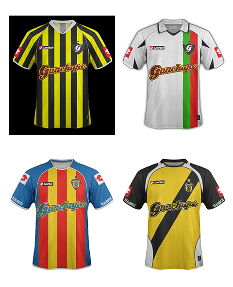 4 modelos de camisetas Guachupé - Lotto Sport